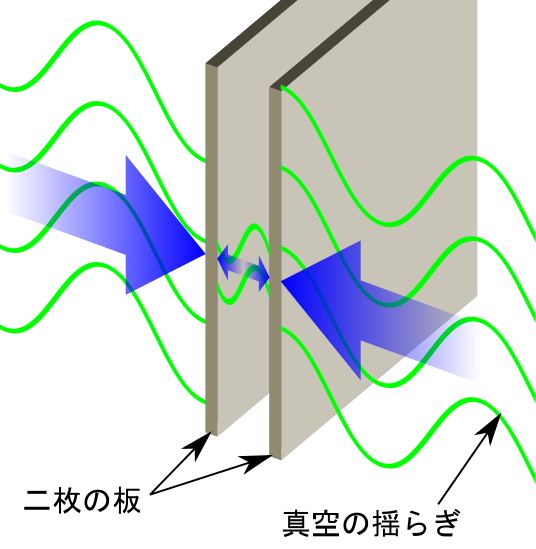 カシミール効果について日本語訳